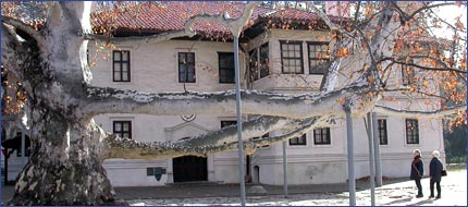 Milošev konak in Belgrade, Serbia/La Résidence Milošev à Belgrade, Serbie